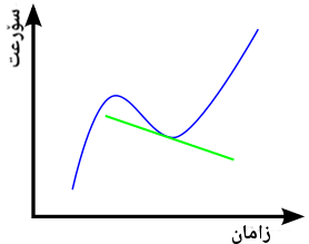 تۆرکجه: ایومه، سۆرعت-زامان گرافیگینده مماس خطین شیبی‌دیر